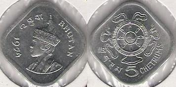 5 chetrums 1974